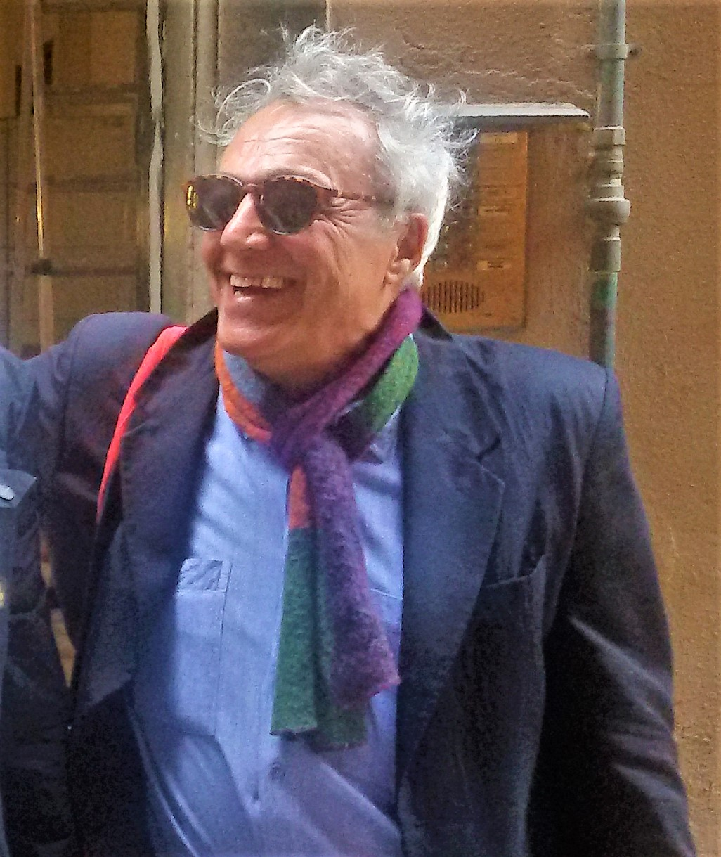 Carlo Picozza al convegno #LIBERI DI ESSERE INFORMATI - Genova, 16 Giugno 2016